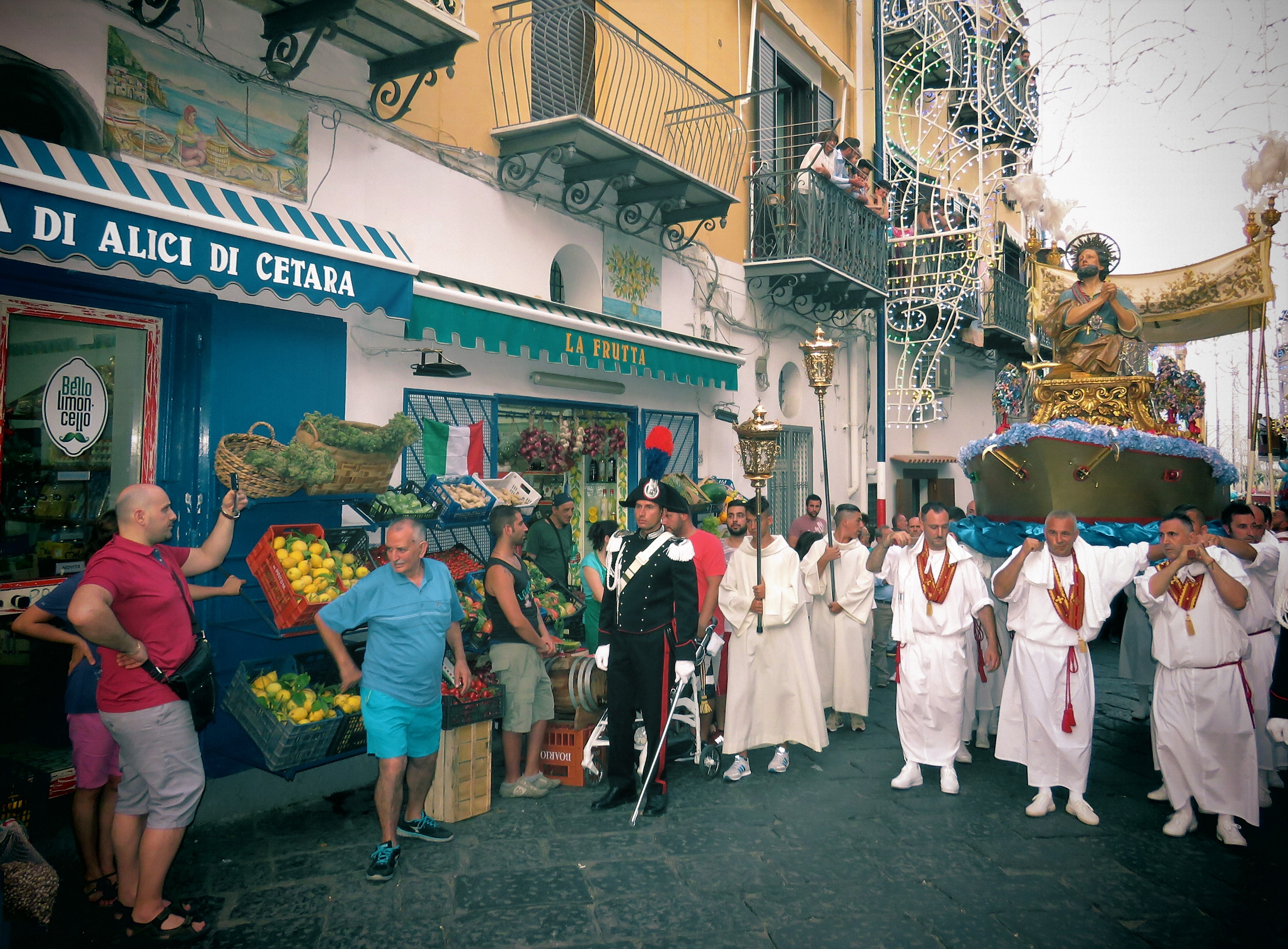 Processione San Pietro a Cetara, Campania.